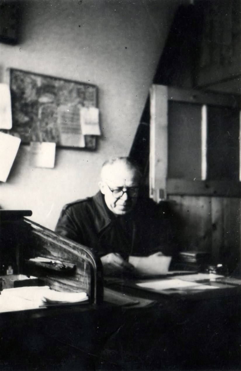 25. B.Sleza na sklonku života